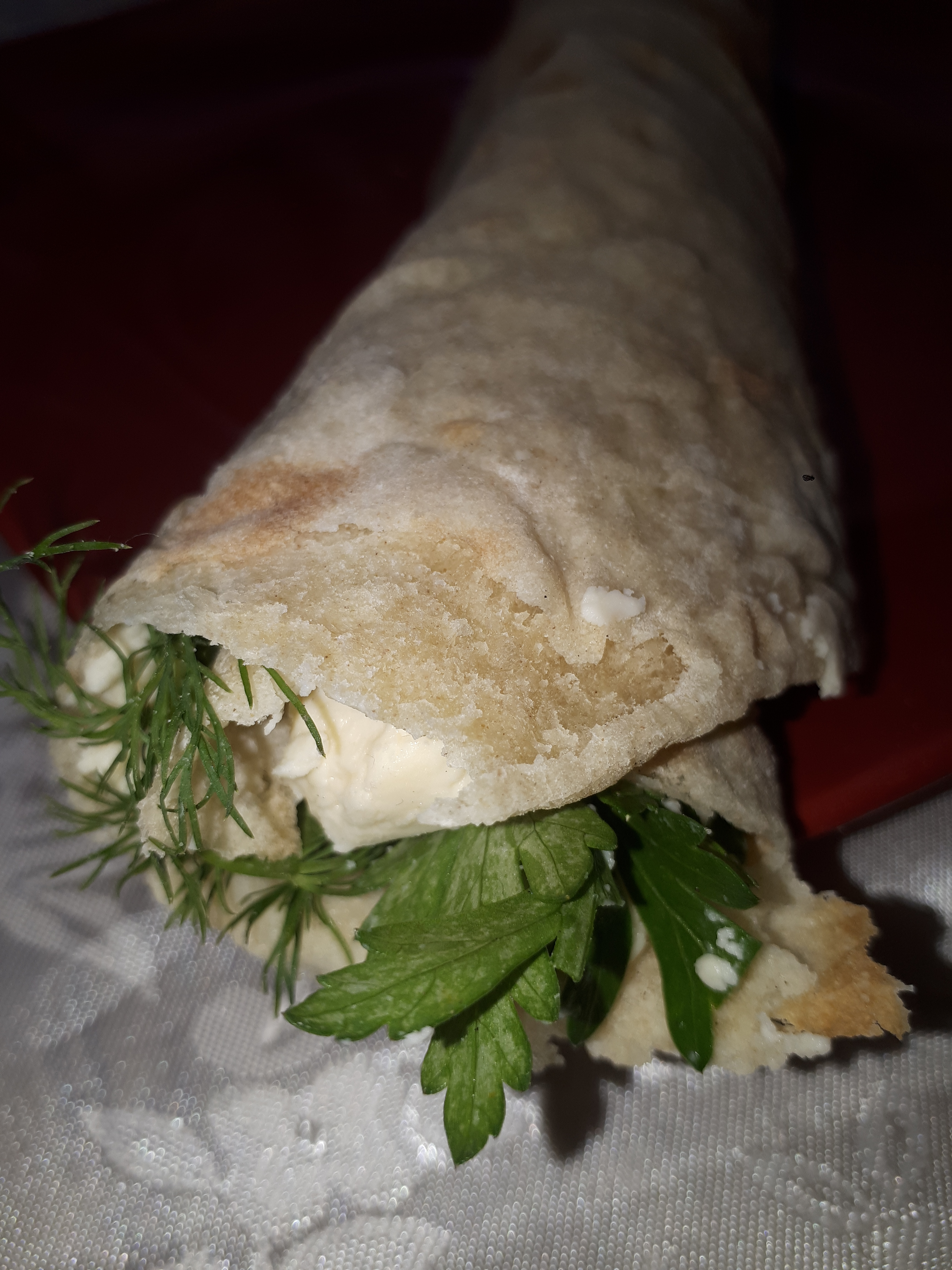 Бртуч из свёрнутого лаваша